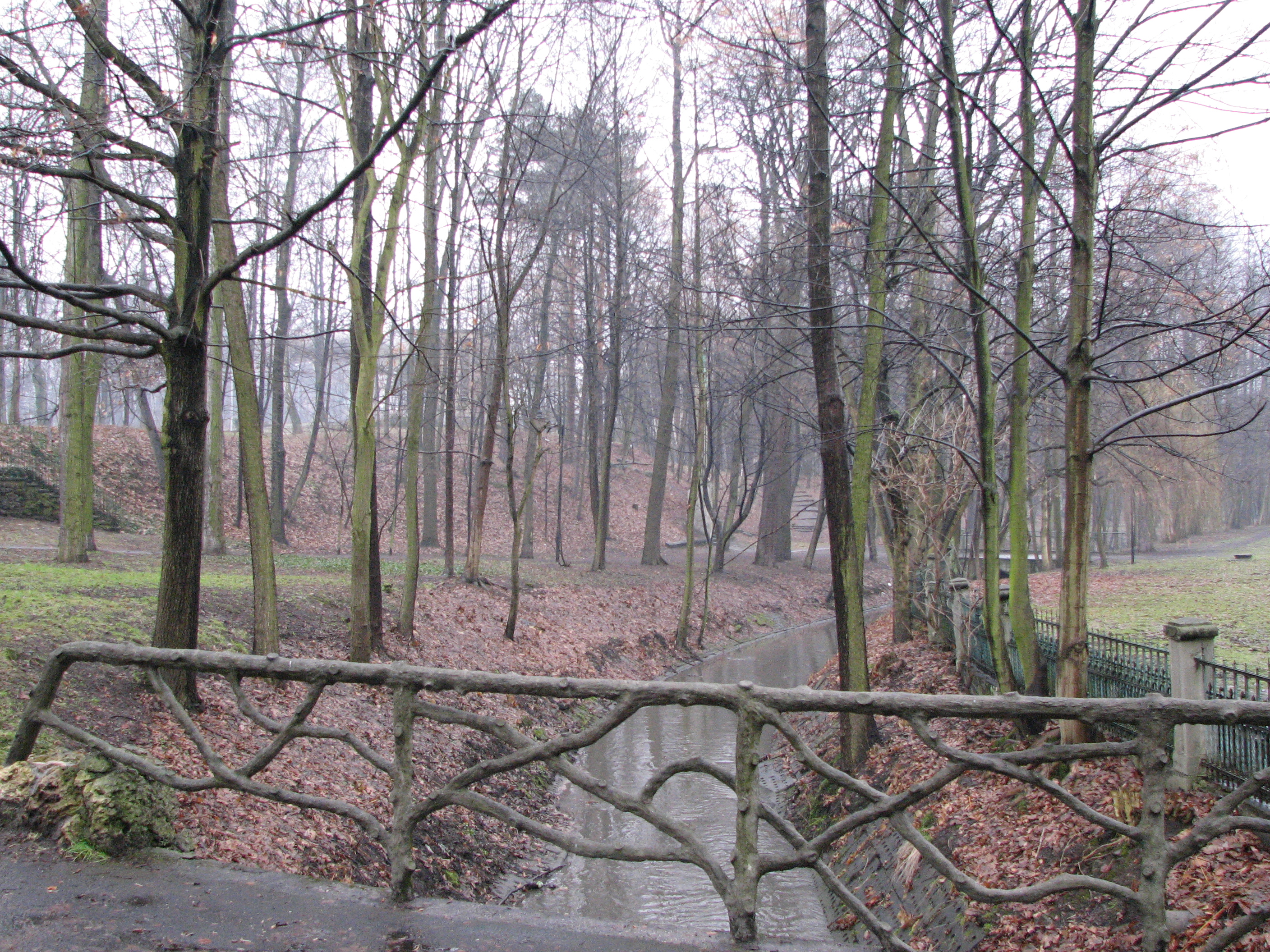 Riparian area of Kłodnica in Katowice Panewniki (2011)